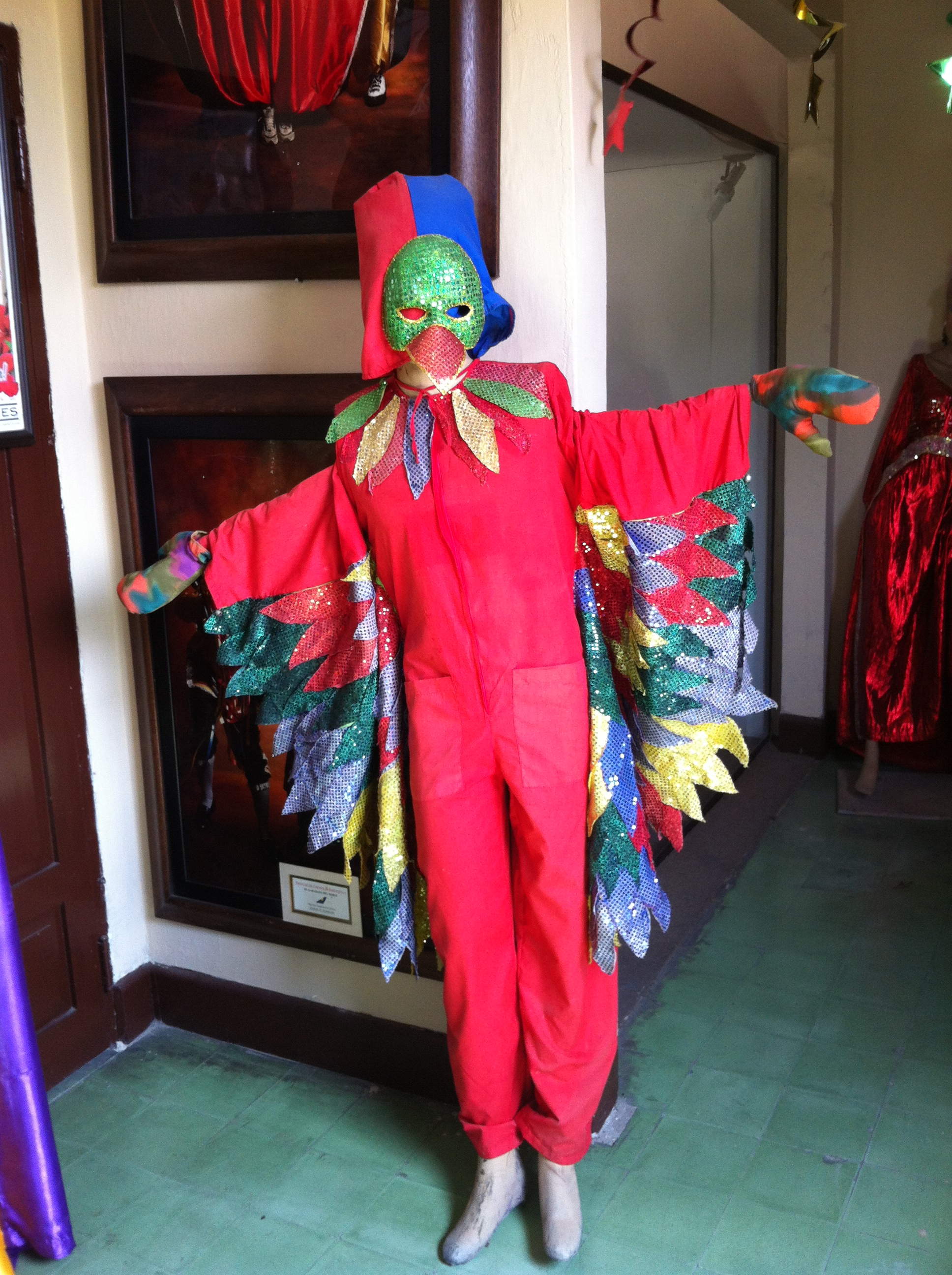 Danza de las Aves - Carnaval de Barranquilla